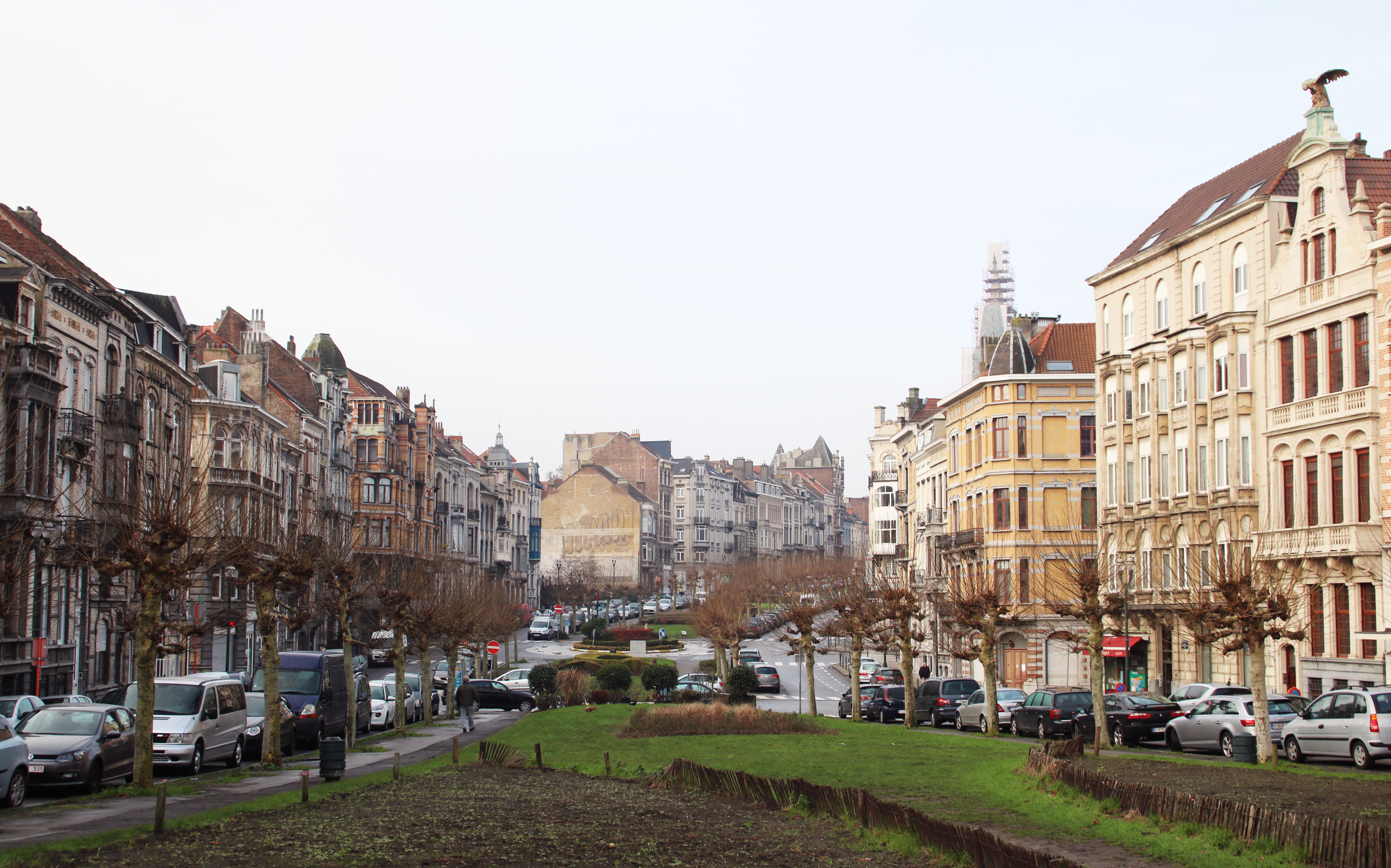 Avenue Louis Bertrand à Bruxelles.